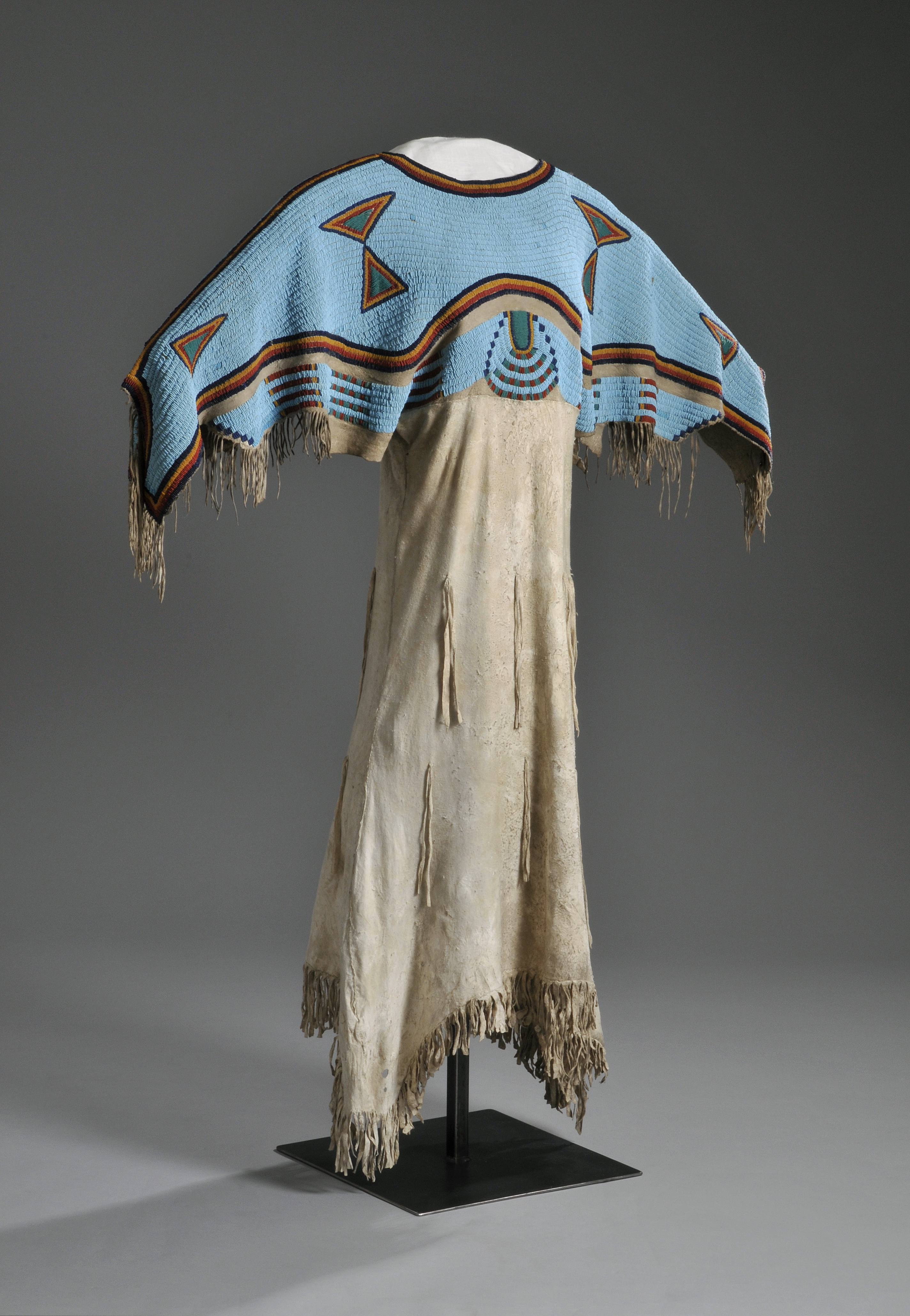 Festkleid der Lakota, Nordamerika, um 1870 © DLM/C. Perl-Appl